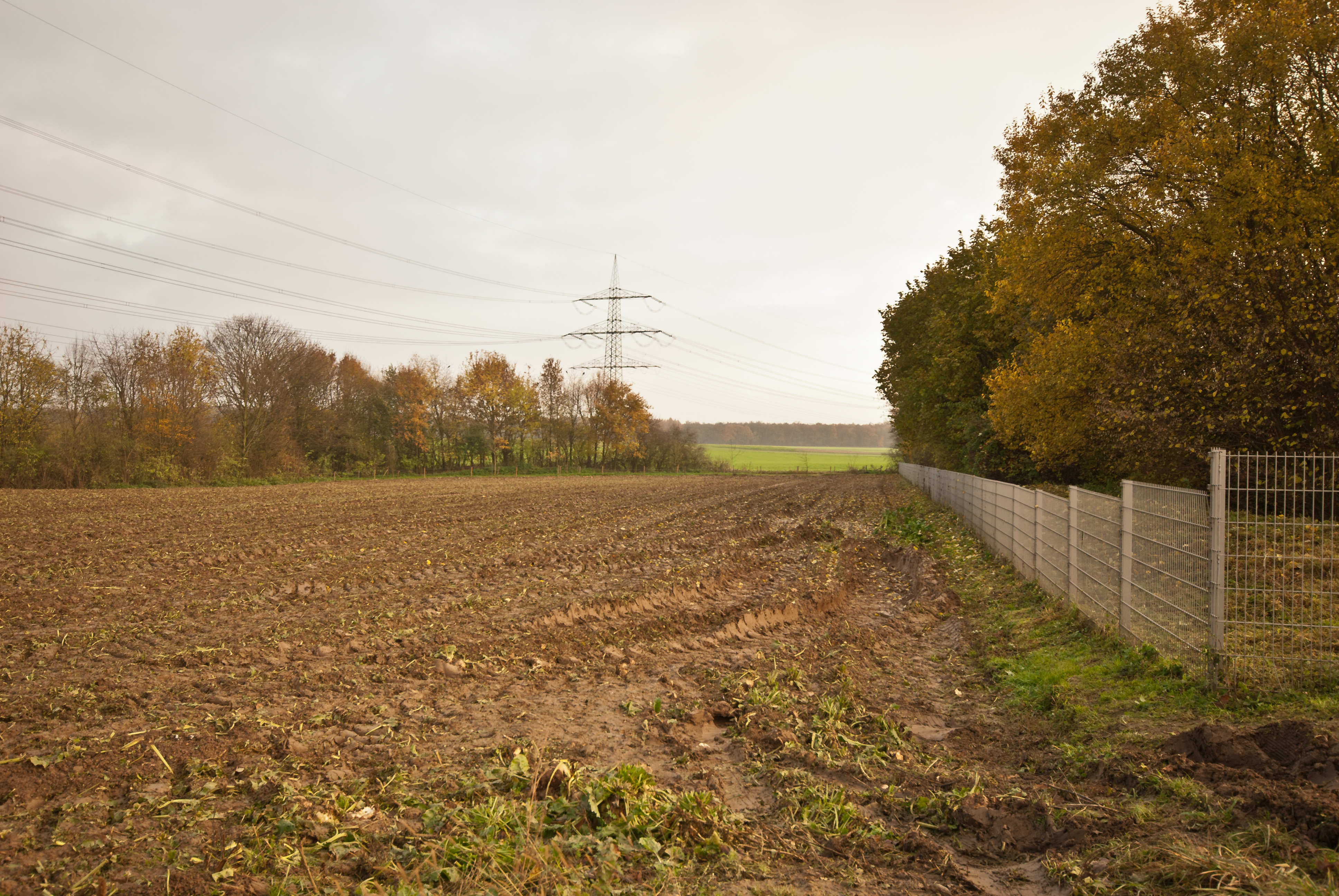 Durch Zuckerrübenernte im Spätherbst bei sehr feuchtem Bodenzustand verursachte Fahrspuren auf einem zur Verdichtung neigenden Braunerdeboden (aus Lehm) der Geilenkirchener Lehmplatte